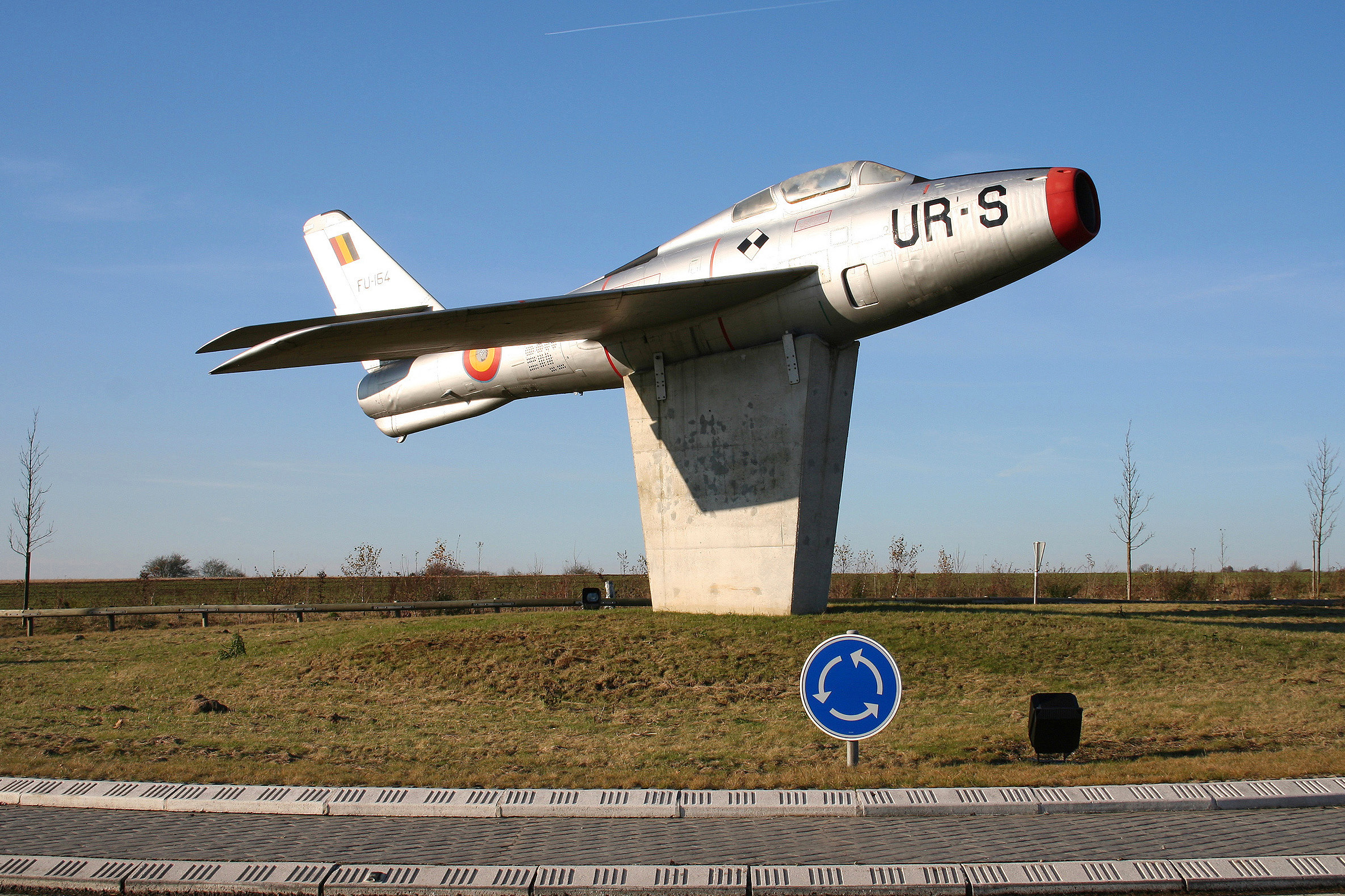 Vodecée (Belgique), le F-84F Thunderstreak placé sur le rond-point du carrefour formé par les rues de Namur, de la Ferme du Vivier et de la Barrière Luc.